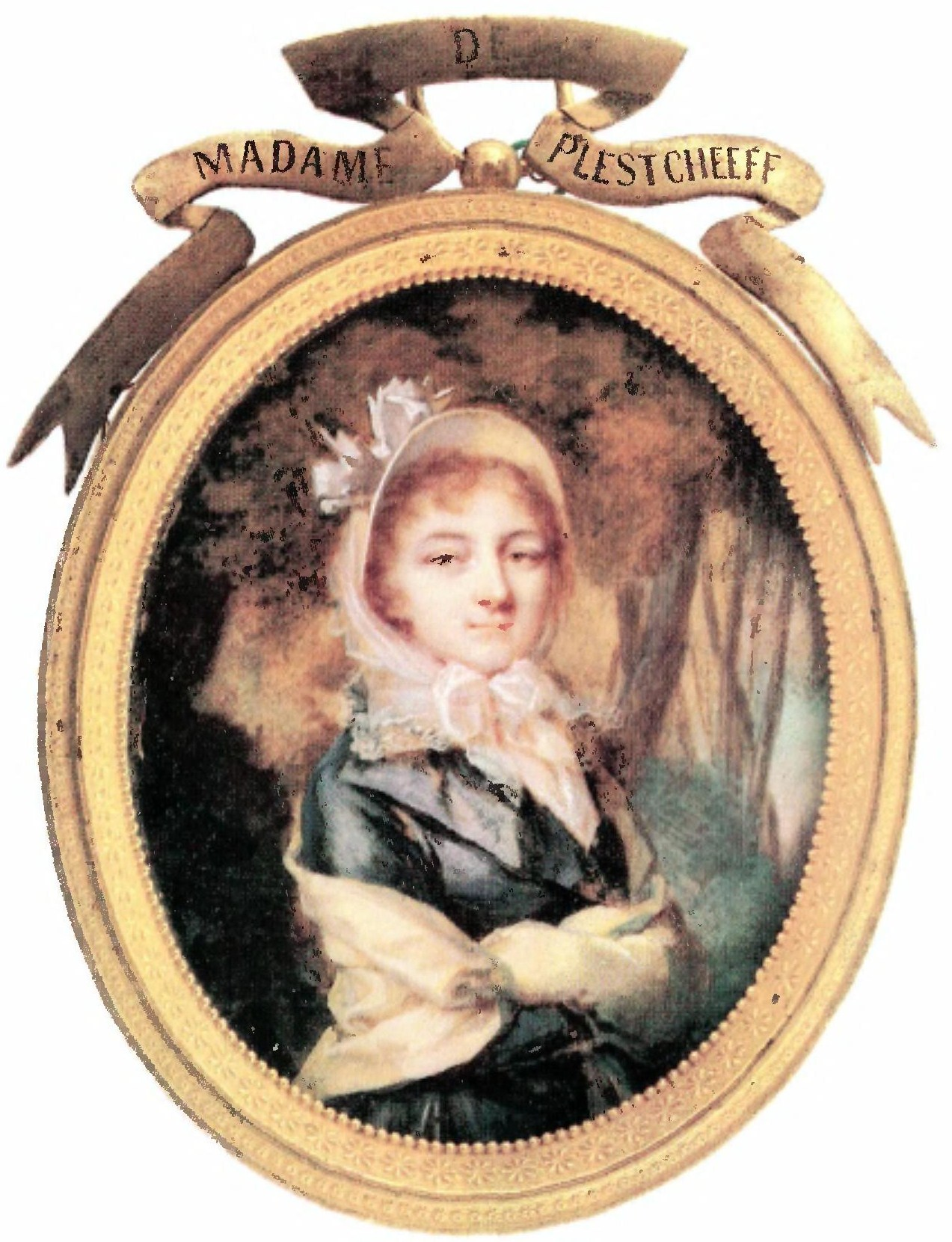 Наталия Фёдотовна Плещеева (1768—1855), дочь генерал-майора Федота Михайловича Веригина, супруга действительного тайного советника Сергея Ивановича Плещеева (1752 -1802), выпускница Смольного института, любимая фрейлина императрицы Марии Фёдоровны. Их сын Михаил (13.11.1799-14.09.1805)